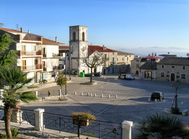 Piazza Garibaldi a Buonalbergo (BN).